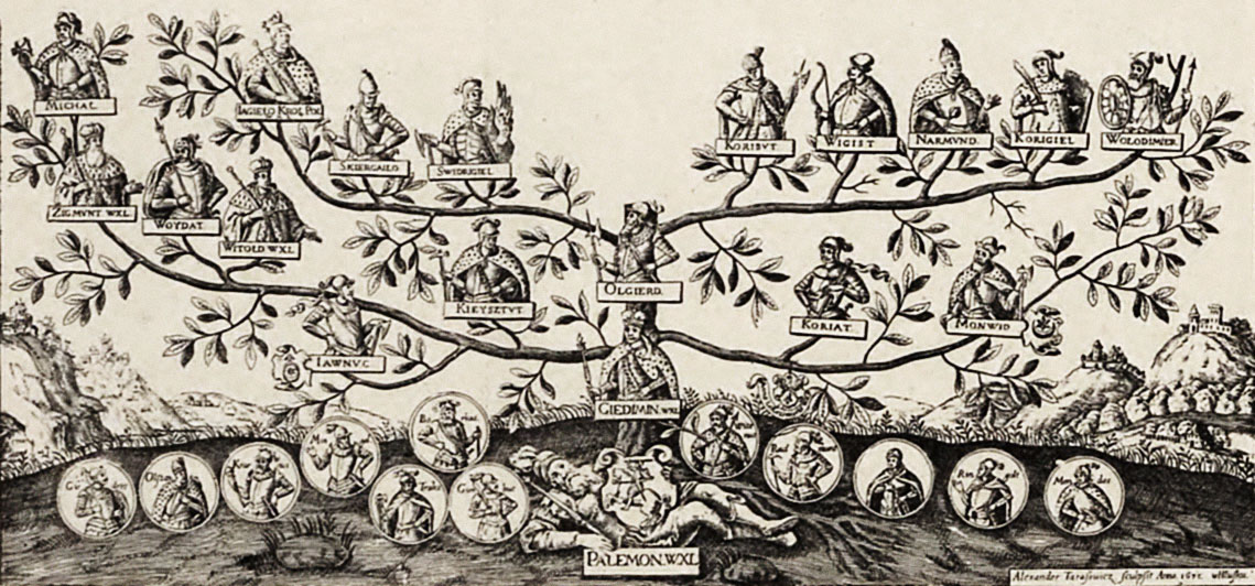 Беларуская (тарашкевіца): Радавод вялікіх князёў літоўскіх